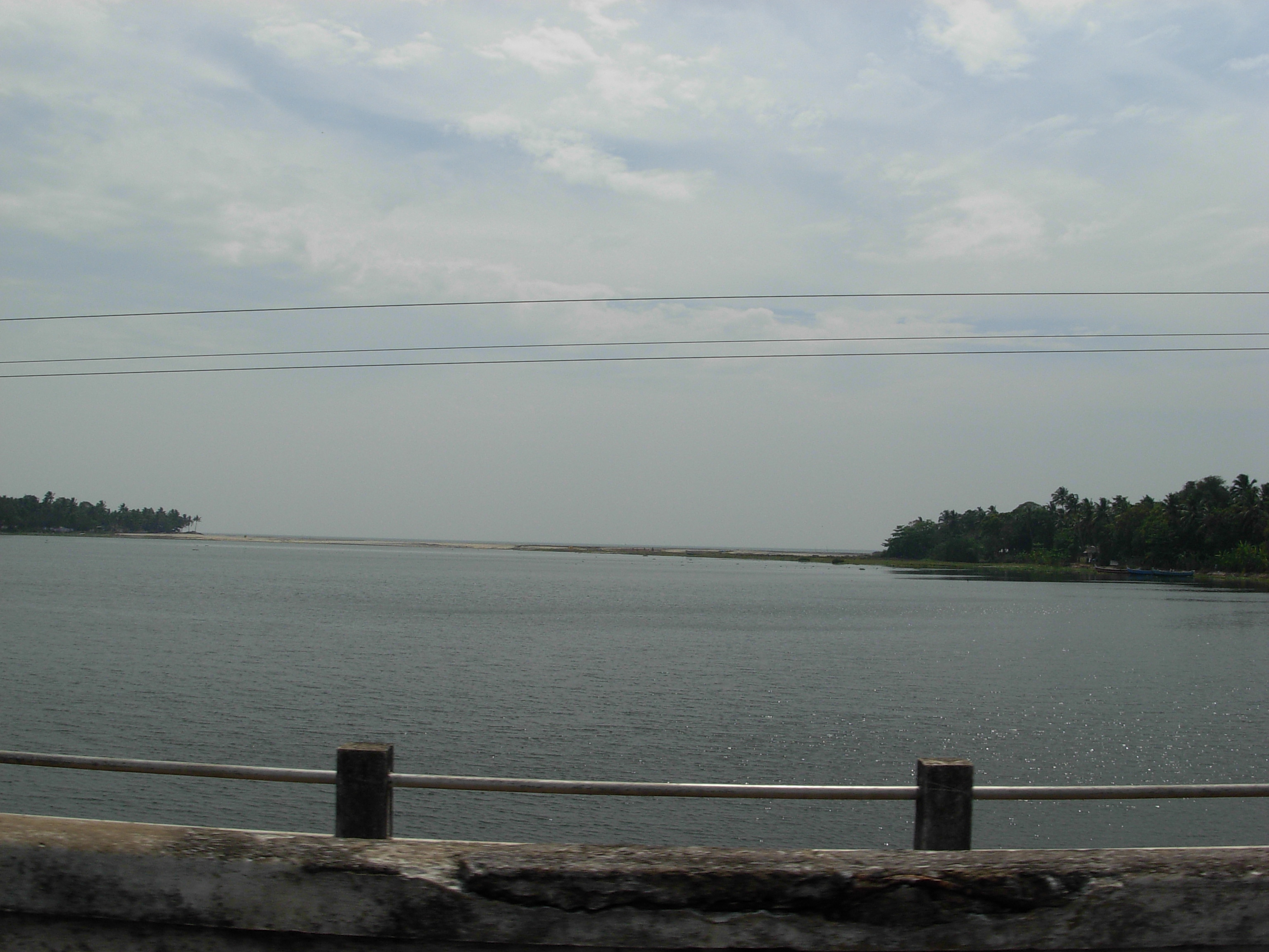 കായലും കടലും ഒരുമിക്കുന്ന ആലപ്പുഴ ജില്ലയിലെ തോട്ടപ്പള്ളി.